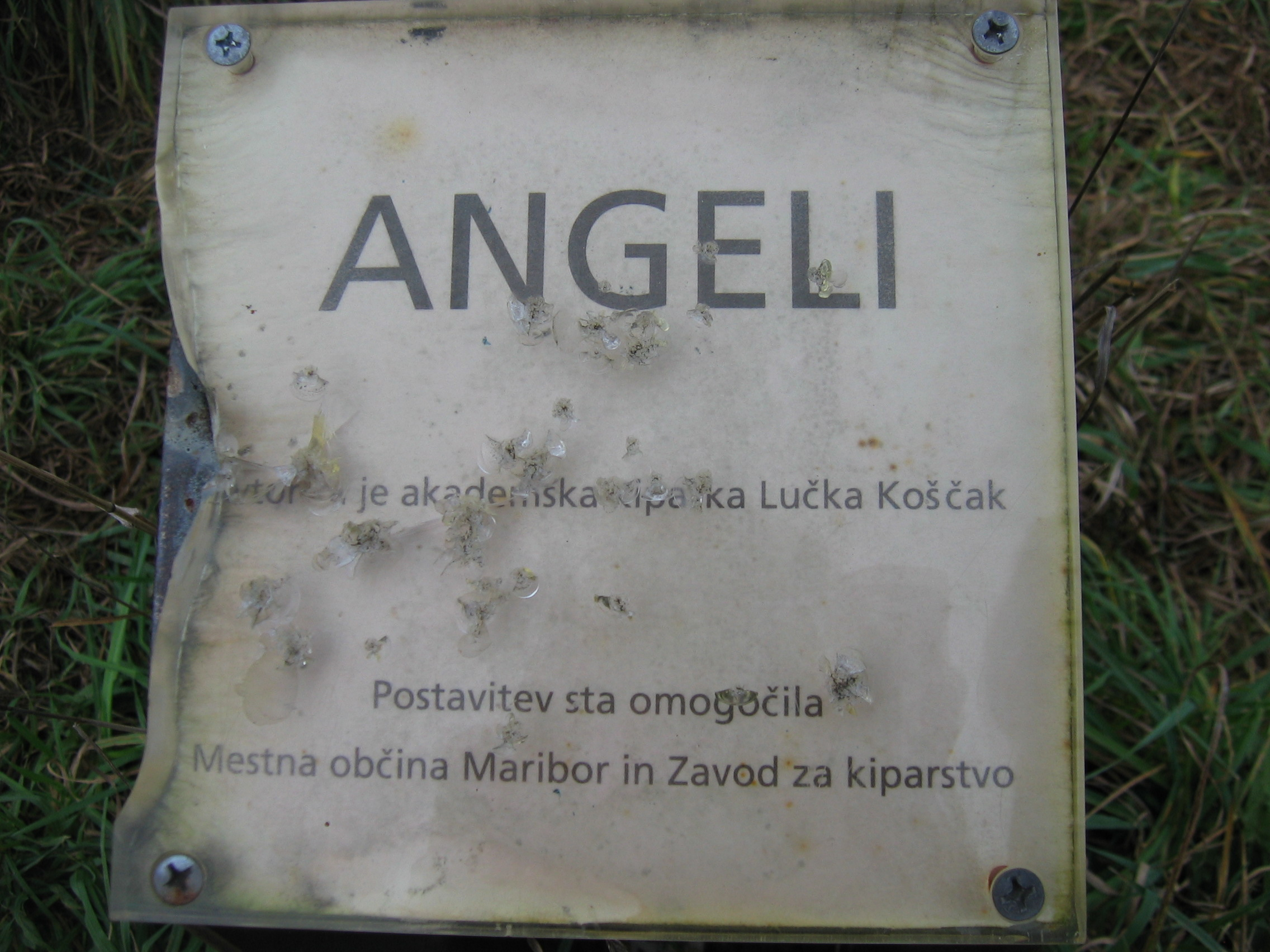 Angeli pri Kamniškem drevoredu.